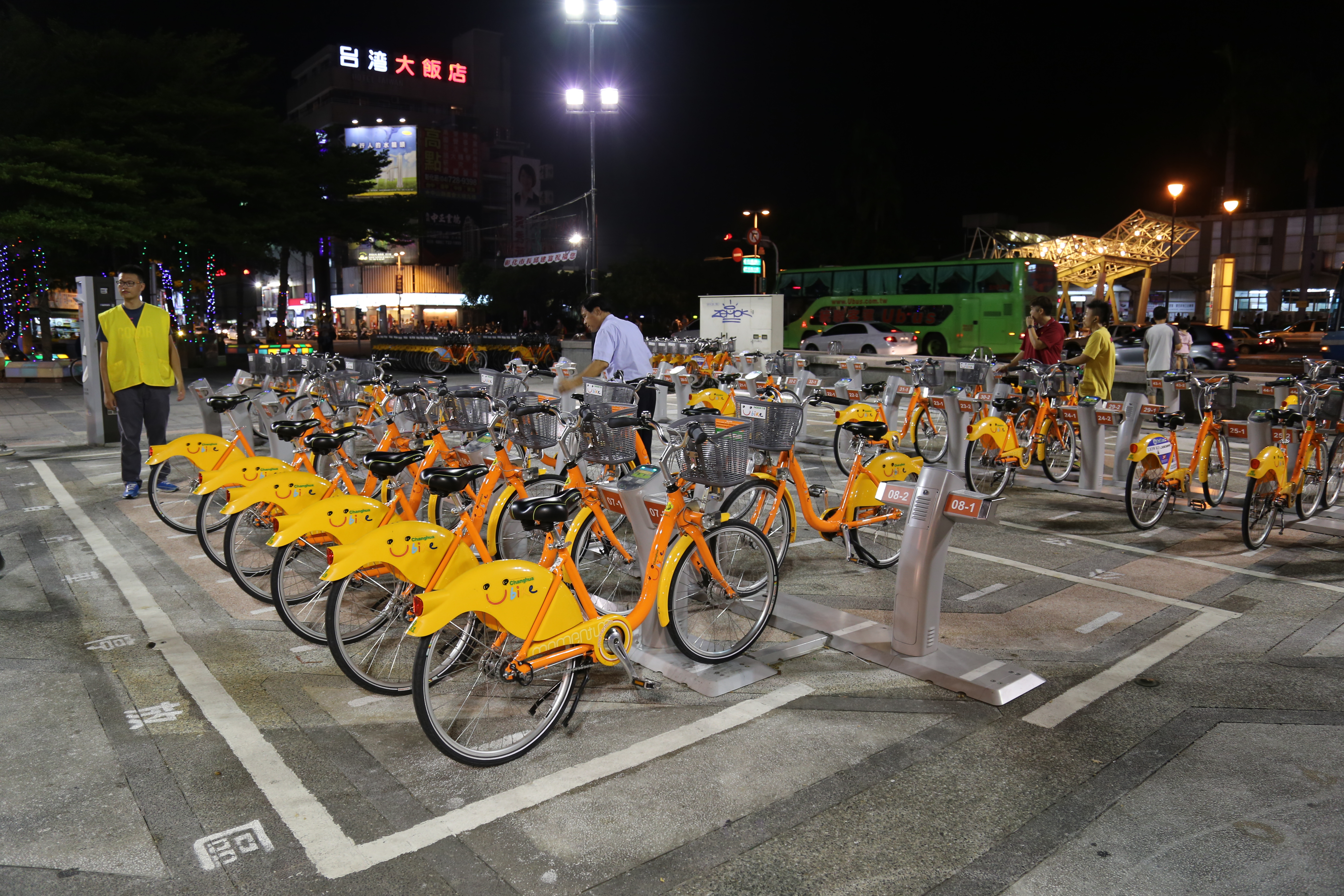 彰化車站前的Youbike